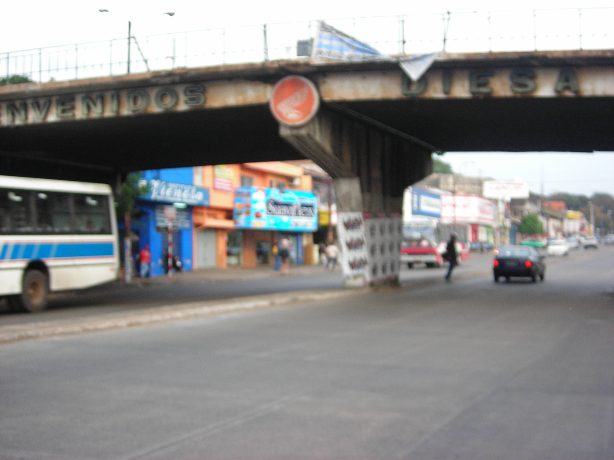 viaduc